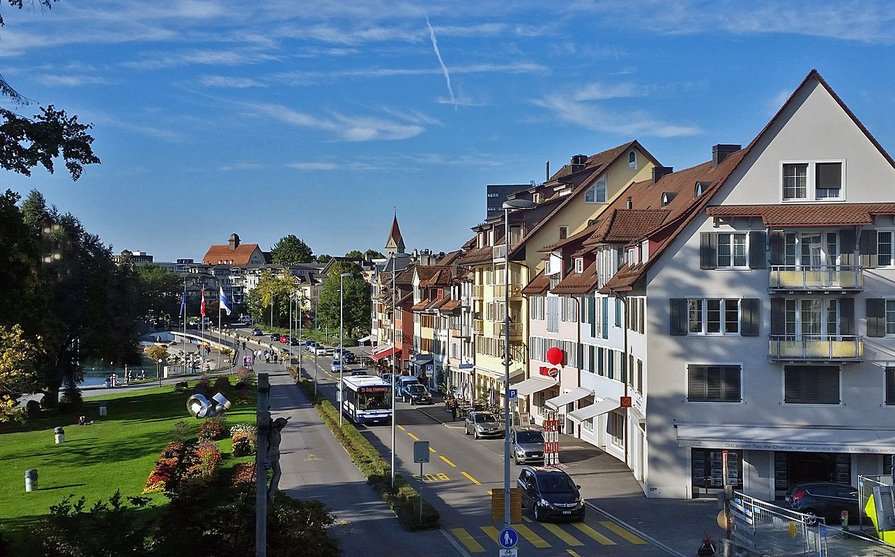 Zug, Vorstadt